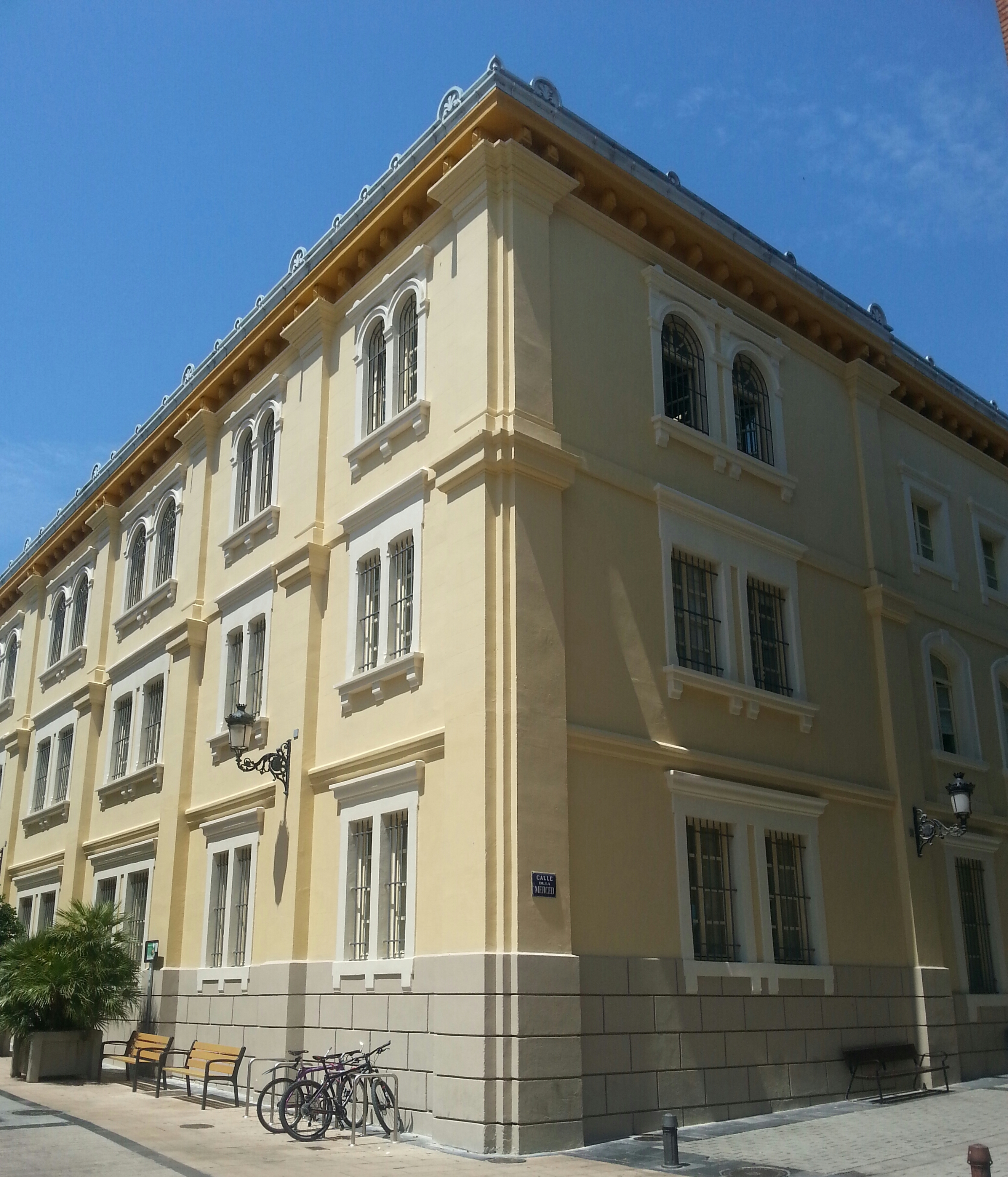 Biblioteca de La Rioja, Exconvento de la Merced y Exfábrica de Tabacos de Logroño